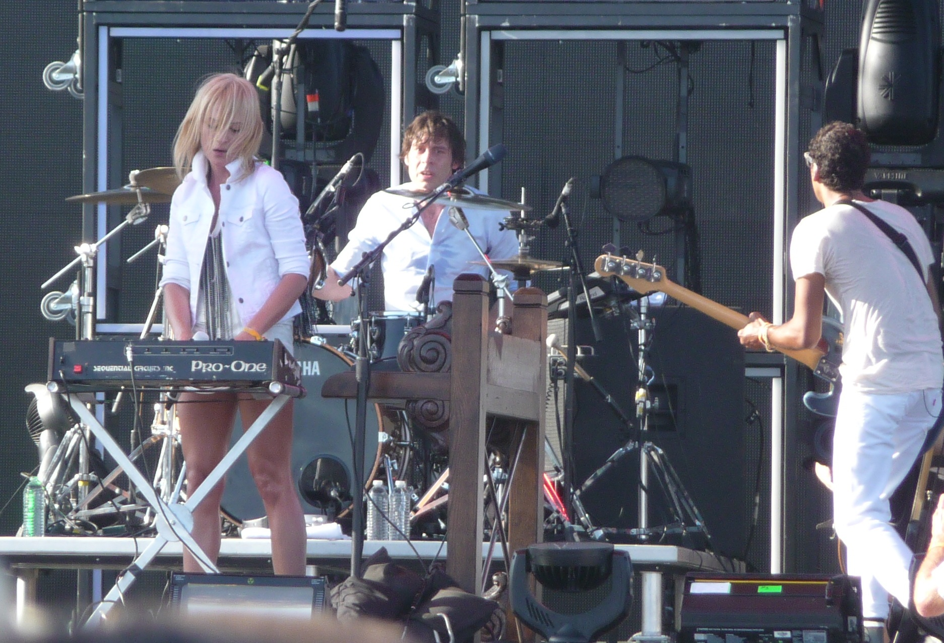 Metric